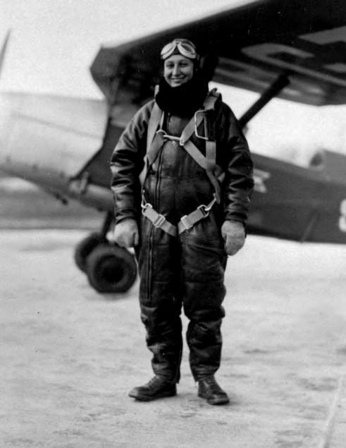 Janina Lewandowska